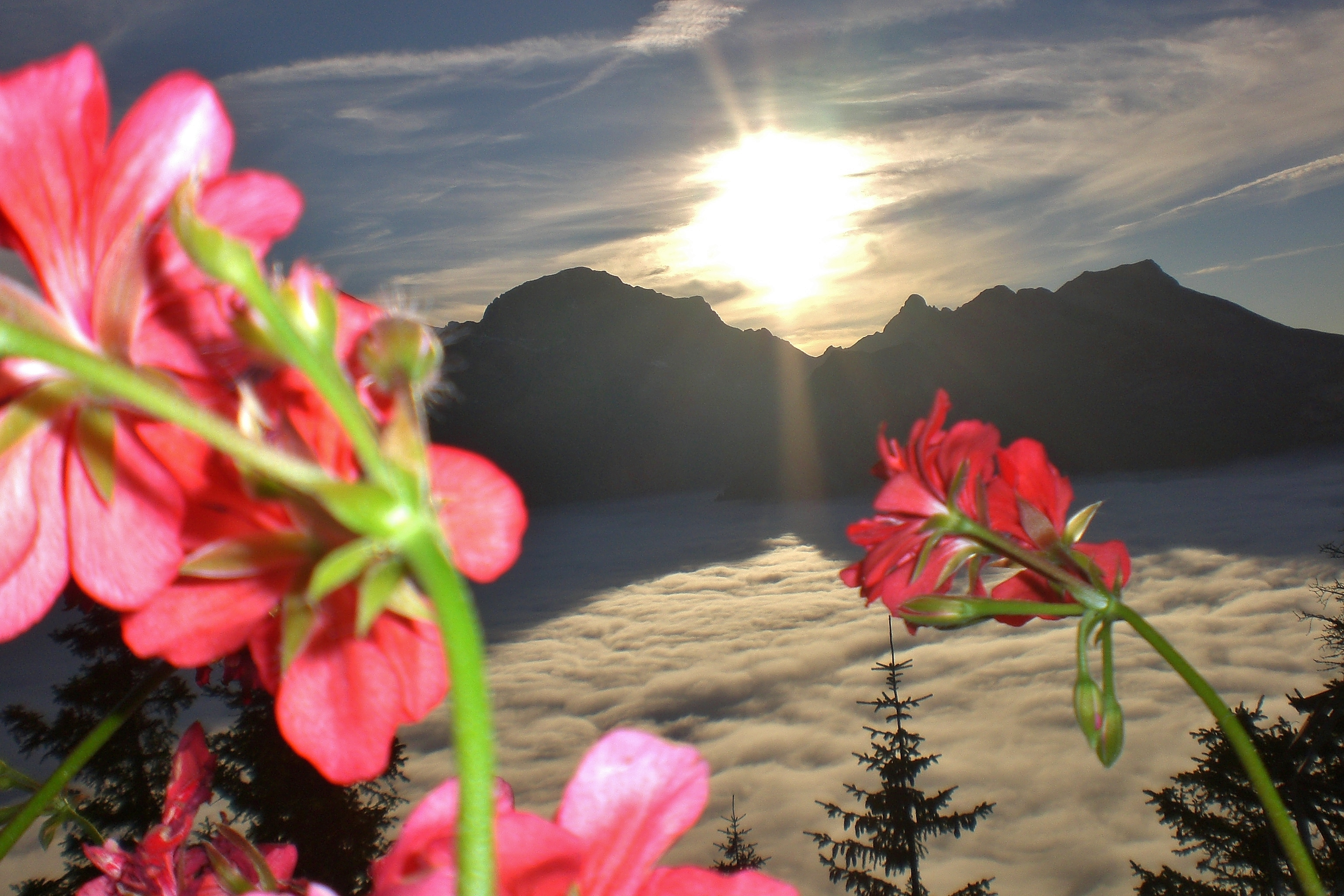 Sonnenuntergang aus einem Schlafraum der Brunnihütte oberhalb Engelberg.